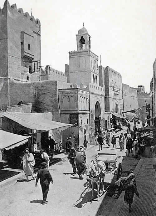 Détail de la CP ND n°42, Coll. G. Bacquet.